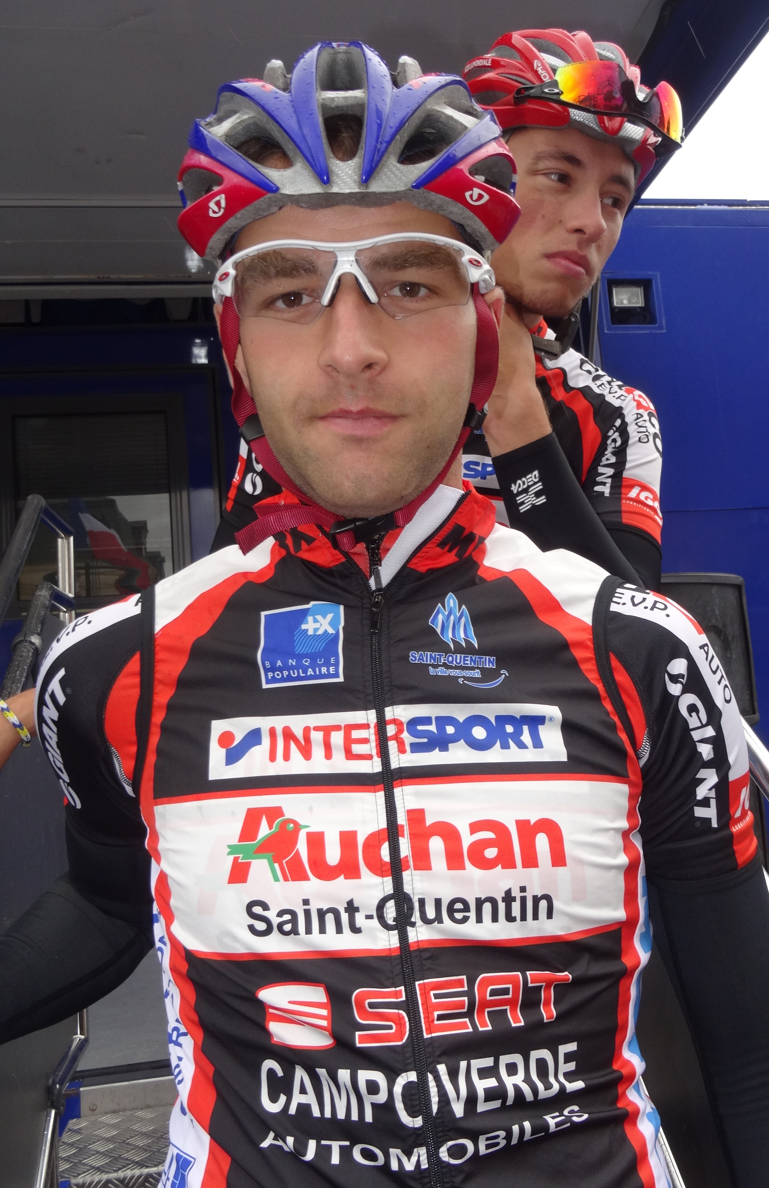 Reportage photographique réalisé le dimanche 13 juillet à l'occasion du départ et de l'arrivée de la Ronde pévéloise 2014 à Pont-à-Marcq, Nord-Pas-de-Calais, France.